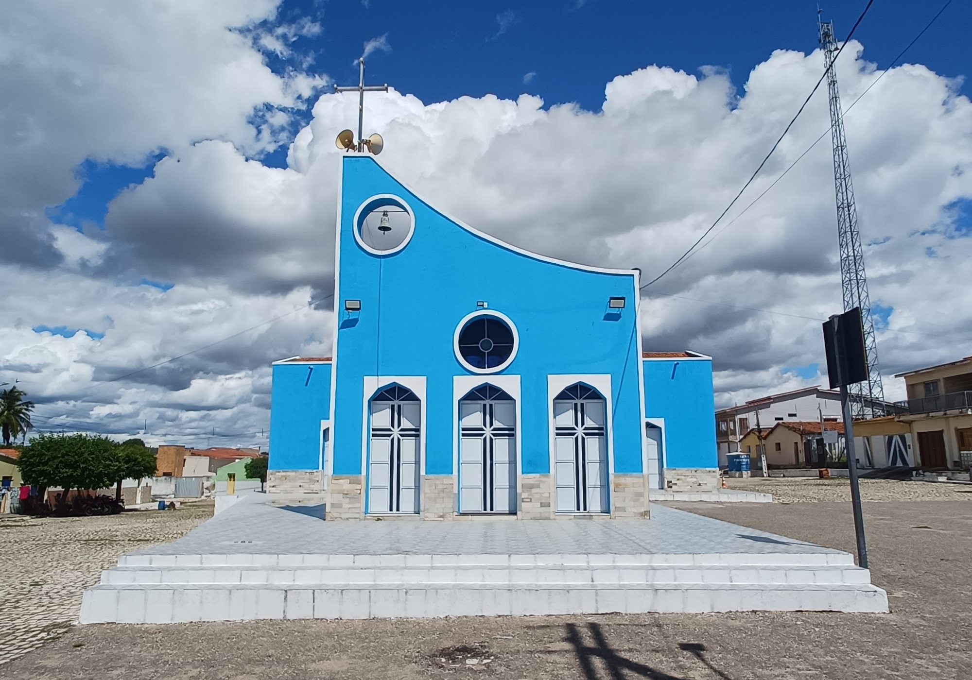 Capela de Santo Expedito, da Paróquia de São Francisco de Assis, no distrito de Major Felipe, em José da Penha, Rio Grande do Norte, Brasil.